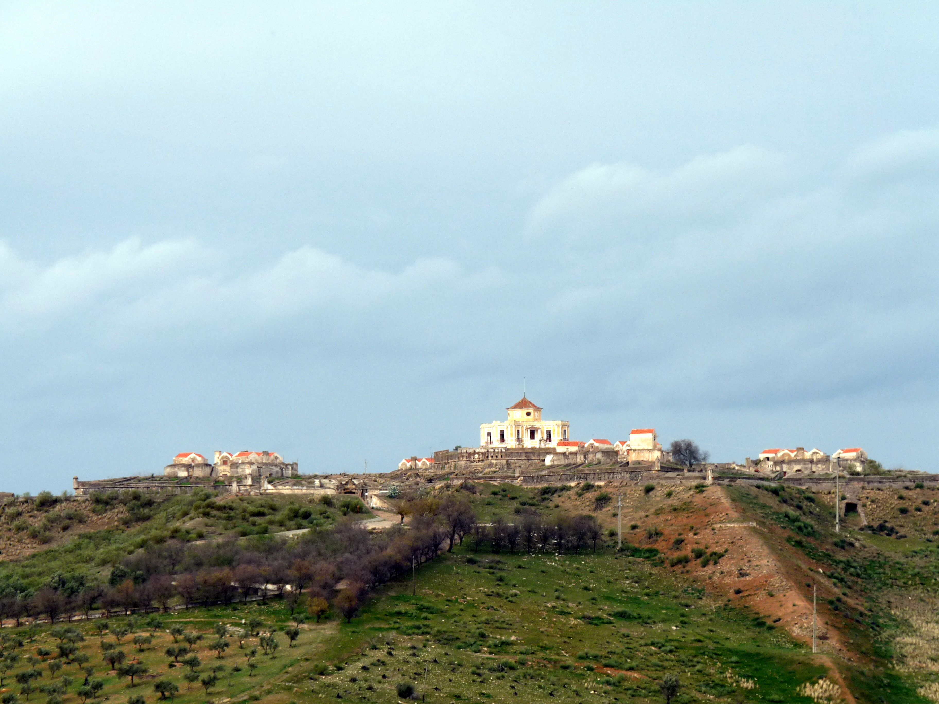 Elvas - Forte de Nossa senhora da Graça